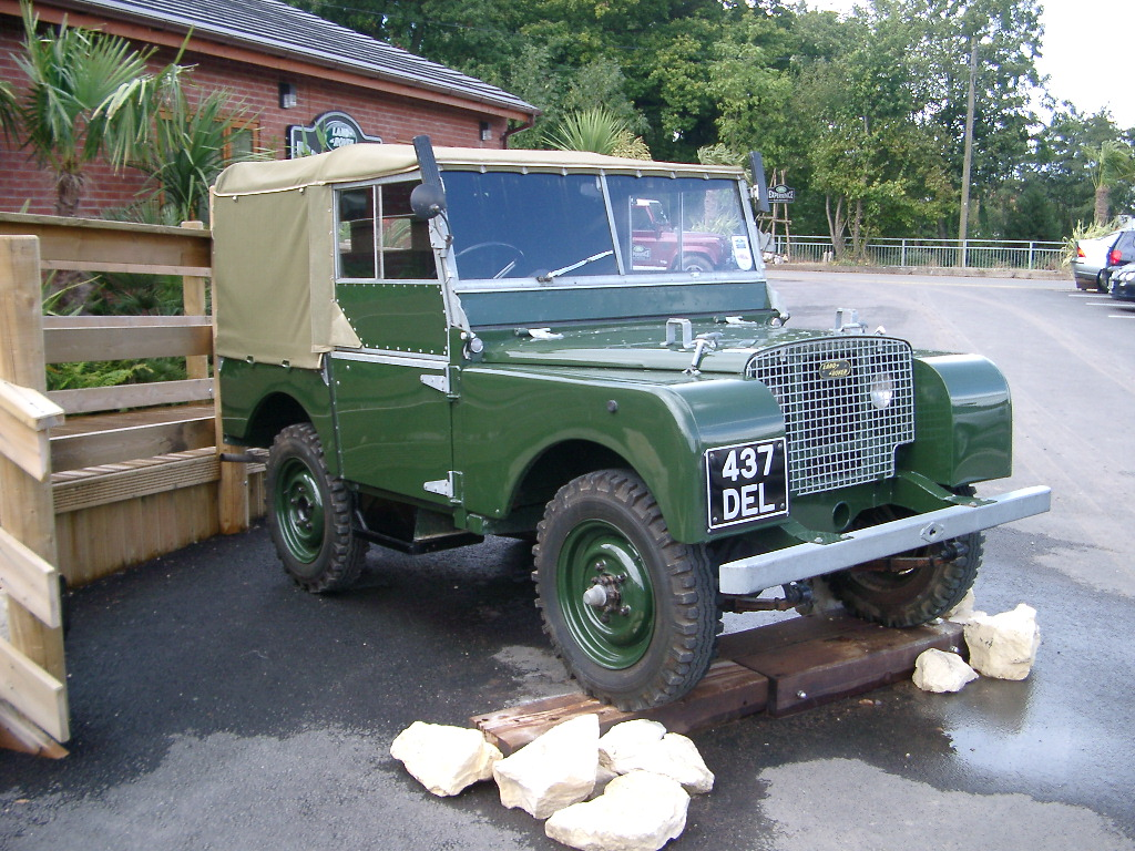 Land Rover Serie 1, Land Rover Museum Gaydon/UK